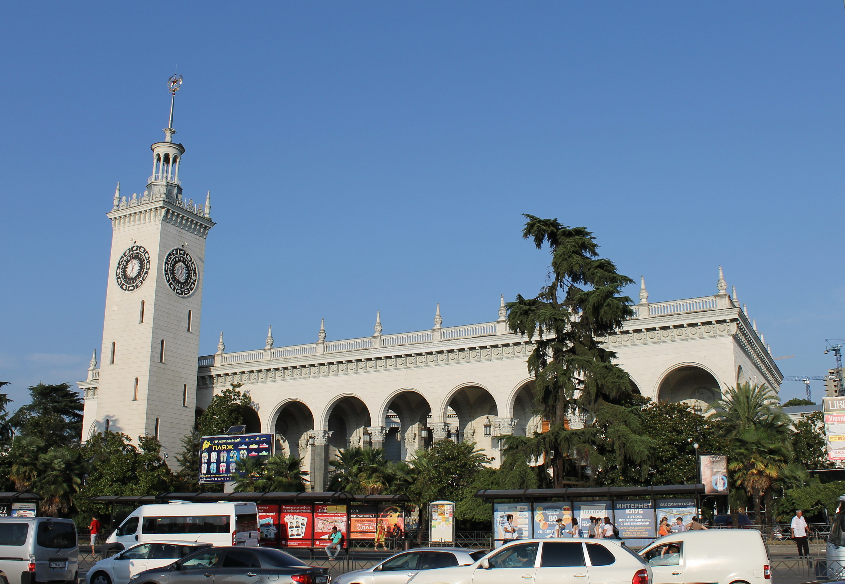 Железнодорожный вокзал города Сочи